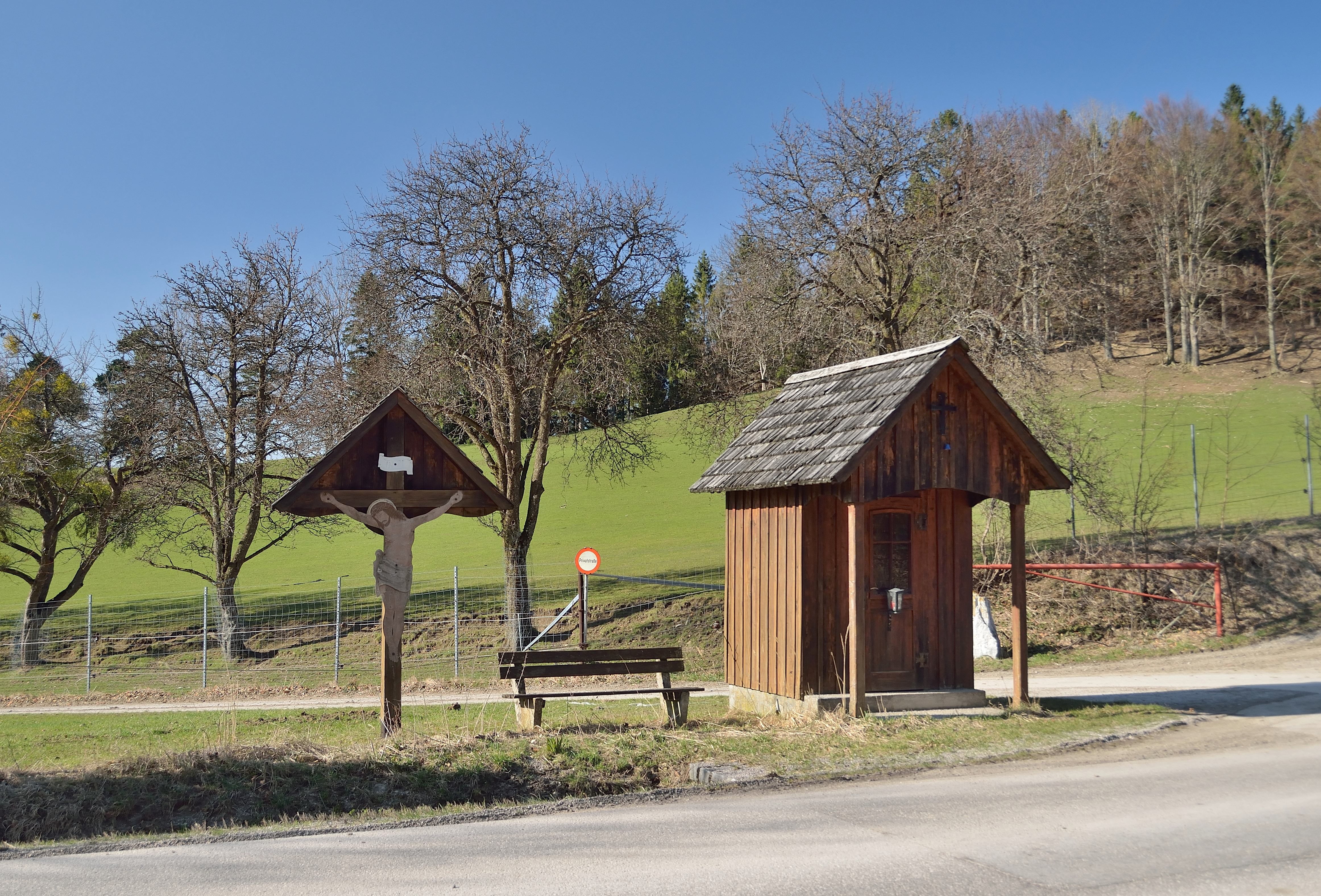 Der Moarigrabensattel (698m) ist ein Gebirgspass in den Türnitzer Alpen in Niederösterreich, zwischen den Ortschaften Tradigist (Gemeinde Rabenstein an der Pielach) und Schrambach (Gemeinde Lilienfeld). 500 m östlich der Passhöhe liegt fast auf gleicher Höhe die Abzweigung zum Bauernhof Loizeder.